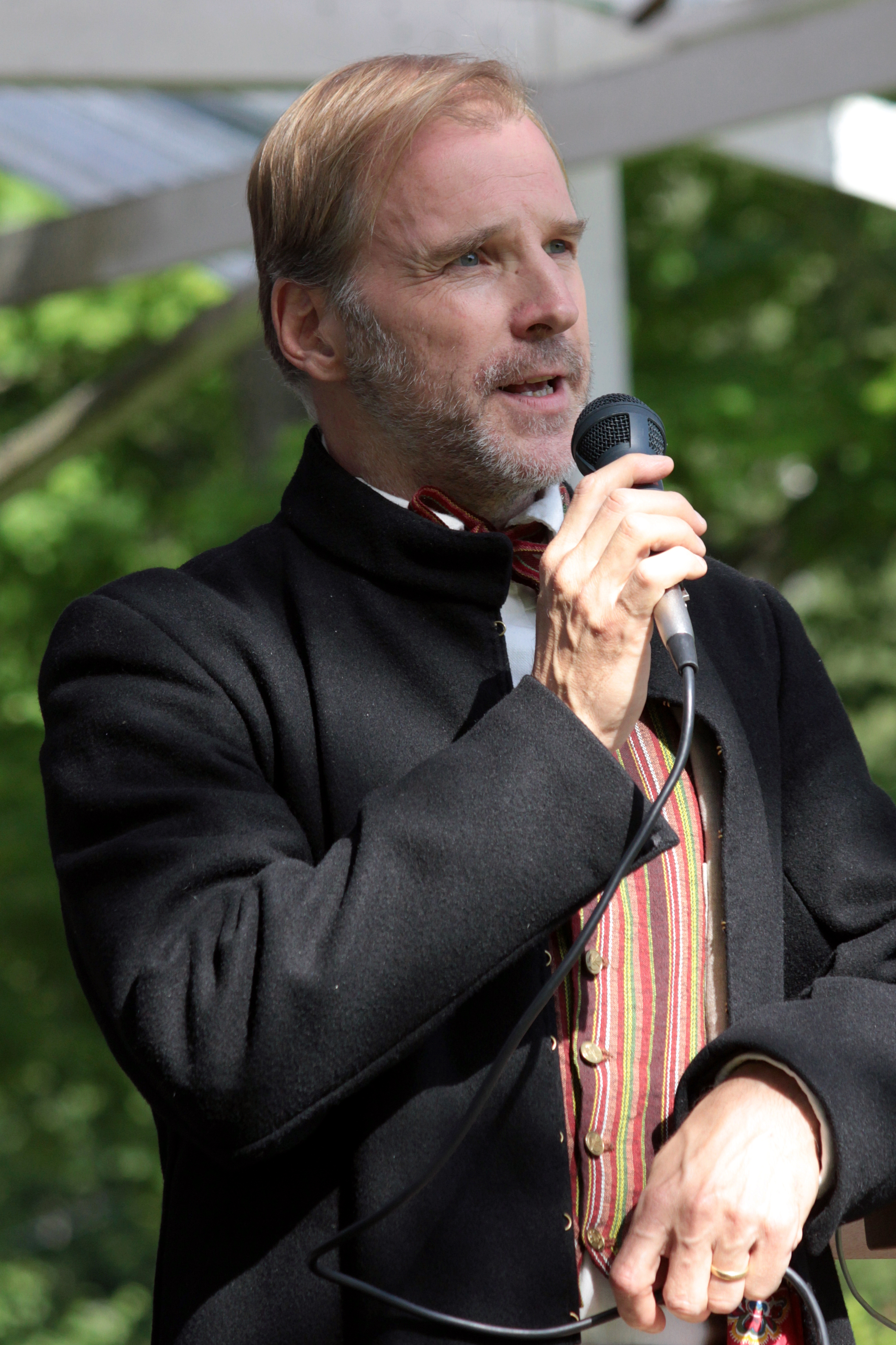 Lars Hjertner, klädd i Bys sockendräkt, på midsommarfirandet i Horndal 2012.